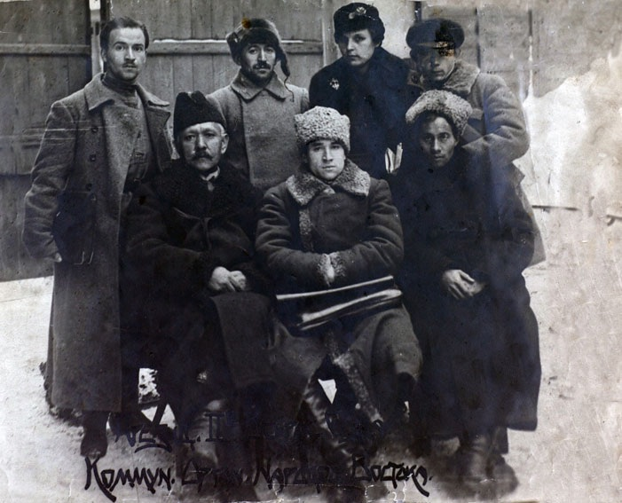 Mirsaid Sultangaliyev Doğu Halkları Komünist Örgütleri İkinci Tüm-Rusya Kongresi'nde. Tarih 15 Aralık 1919 (Sultangaliyev oturanlardan ortadaki)